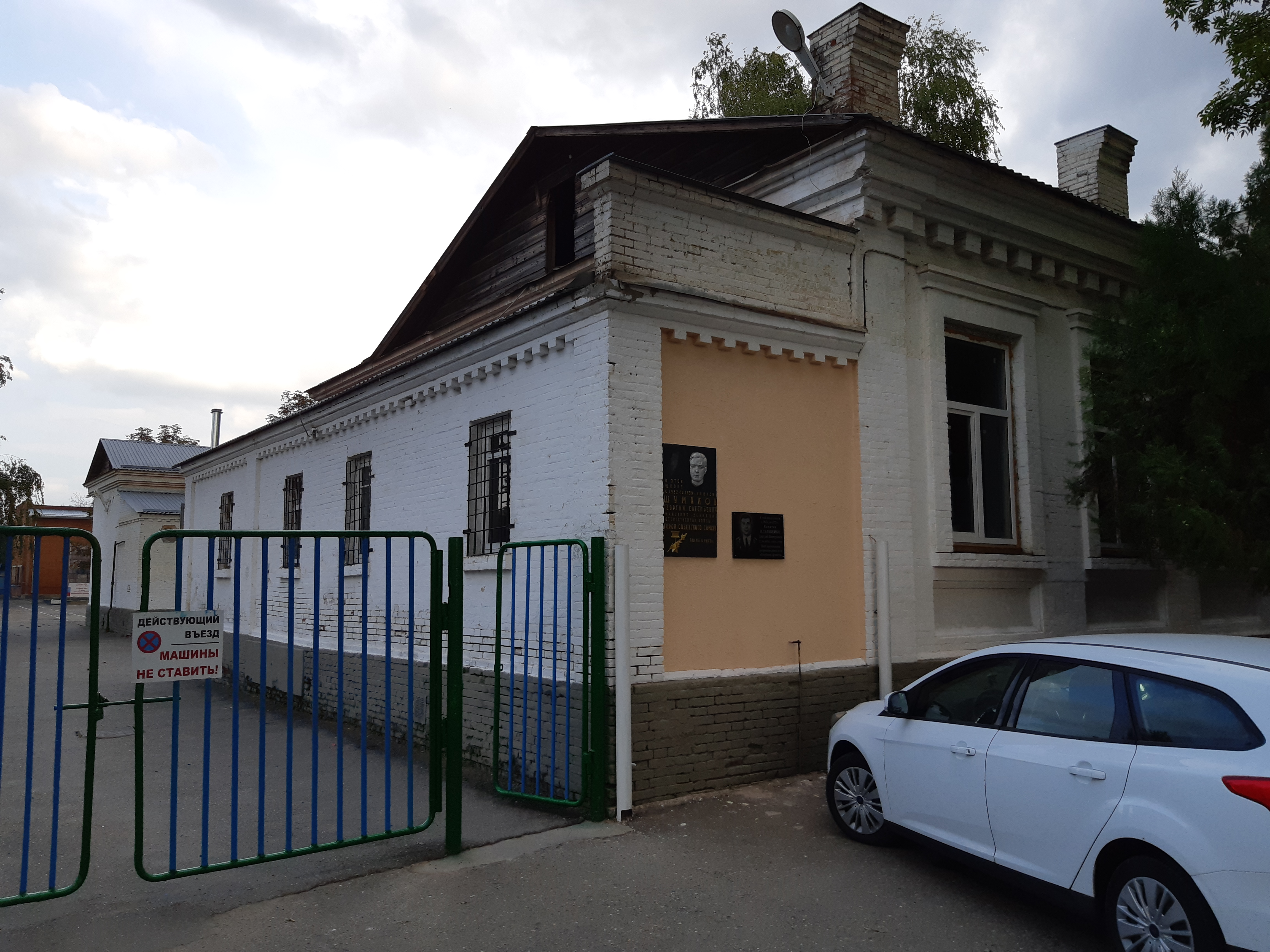 Здание, где учился в школе герой Советского союза Г.Е. Шумаков: улица Гоголя, 112, Майкоп, Адыгея